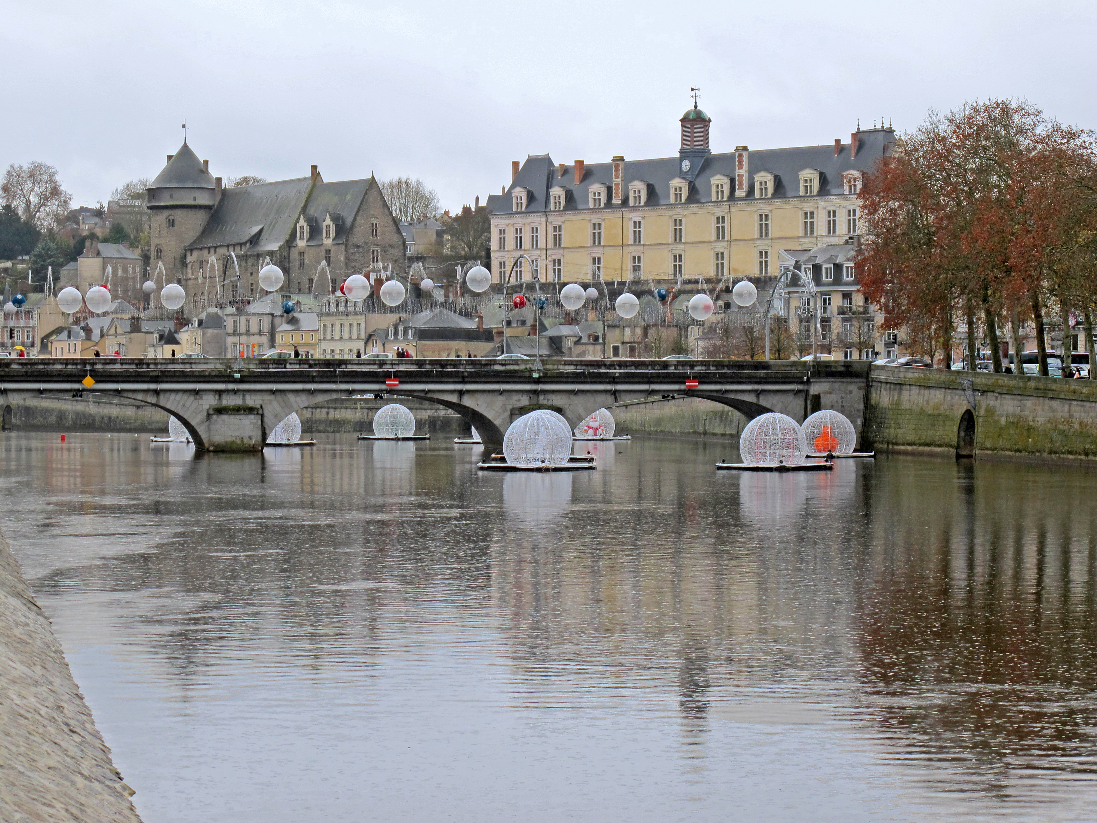 Laval (Mayenne). Le château de Laval , imposant édifice dont l’origine remonte au onzième siècle abrite aujourd'hui la plus belle collection d'Art naïf d'Europe. Un bel hommage posthume à l'un des enfants de Laval, le Douanier Rousseau. le Vieux Château domine la Mayenne par son architecture féodale et son donjon massif. Le donjon date du XIIème siècle il mesure 45 m de haut et 14 m de diamètre. Le château n’est en fait qu’une partie de toute une infrastructure de remparts, destinés à protéger la ville. Au pied du château s’étendaient les douves (aujourd’hui rue piétonne du Val de Mayenne). Le Vieux Pont qui enjambe la Mayenne date du Moyen Age. Le château neuf date du XIXème siècle. Laval (Mayenne). The castle of Laval, imposing building which dates back to the eleventh century now houses the finest collection of Naive Art in Europe. A posthumous tribute to one of the children of Laval, Henri Rousseau. Old Castle overlooking the Mayenne by his feudal architecture and its massive tower. The tower dates from the XIIth century it measures 45 meters high and 14 m in diameter. The castle is actually a part of a whole infrastructure of walls, to protect the city. At the foot of the castle lay the moat (now Rue du Val de Mayenne). The Old Bridge spanning the Mayenne dates from the Middle Ages. The new castle dates from the nineteenth century.